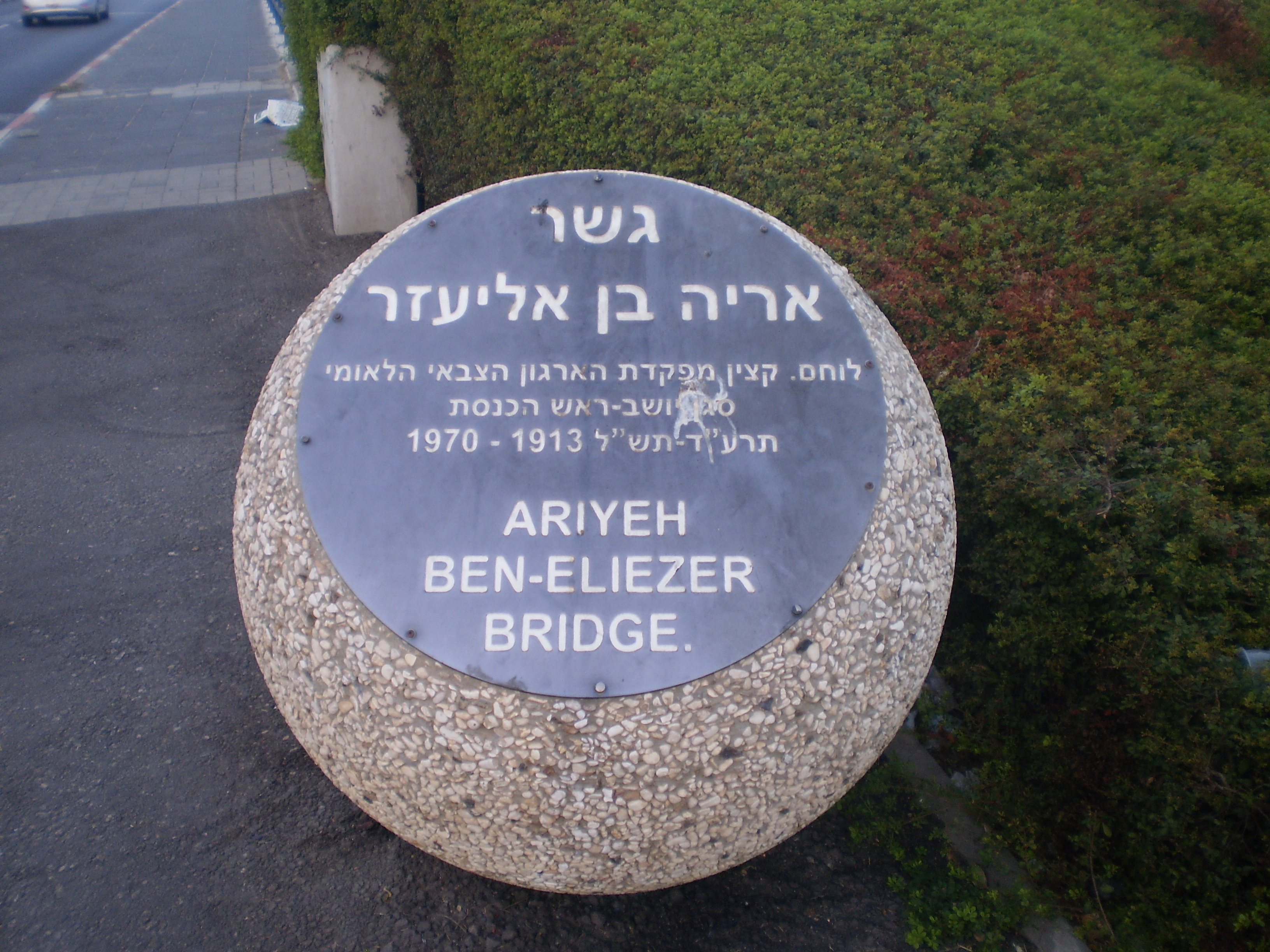 הקדשה בפתח גשר אריה בן אליעזר